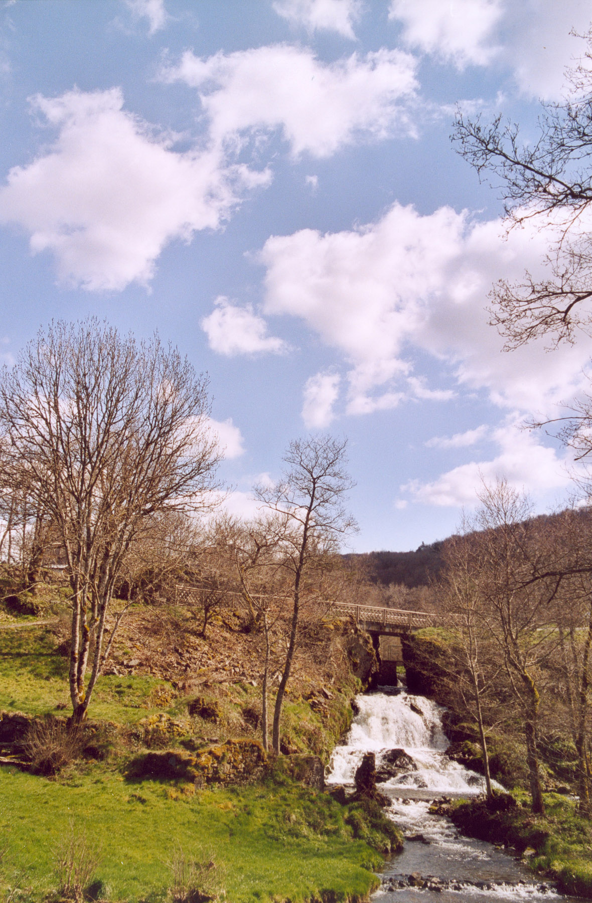 Montfermy Auteur : GIRAUD Patrick